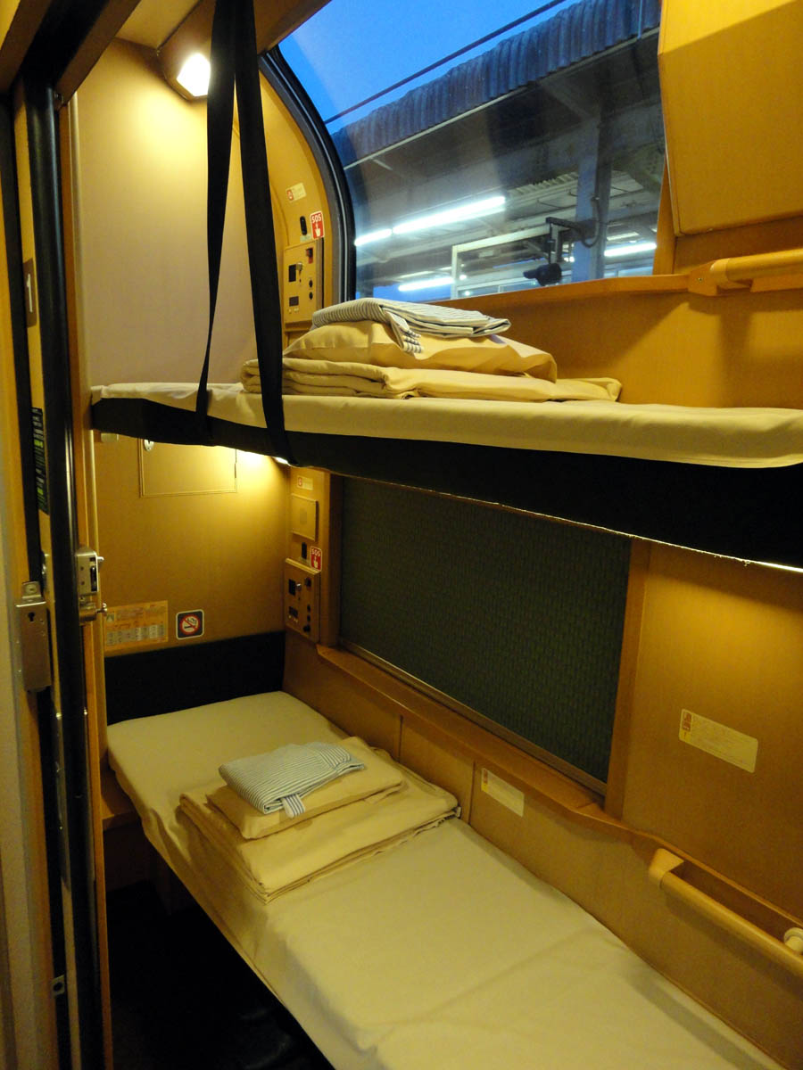 JR西日本285系 B寝台1人用（2i妊用）個室シングルツイン